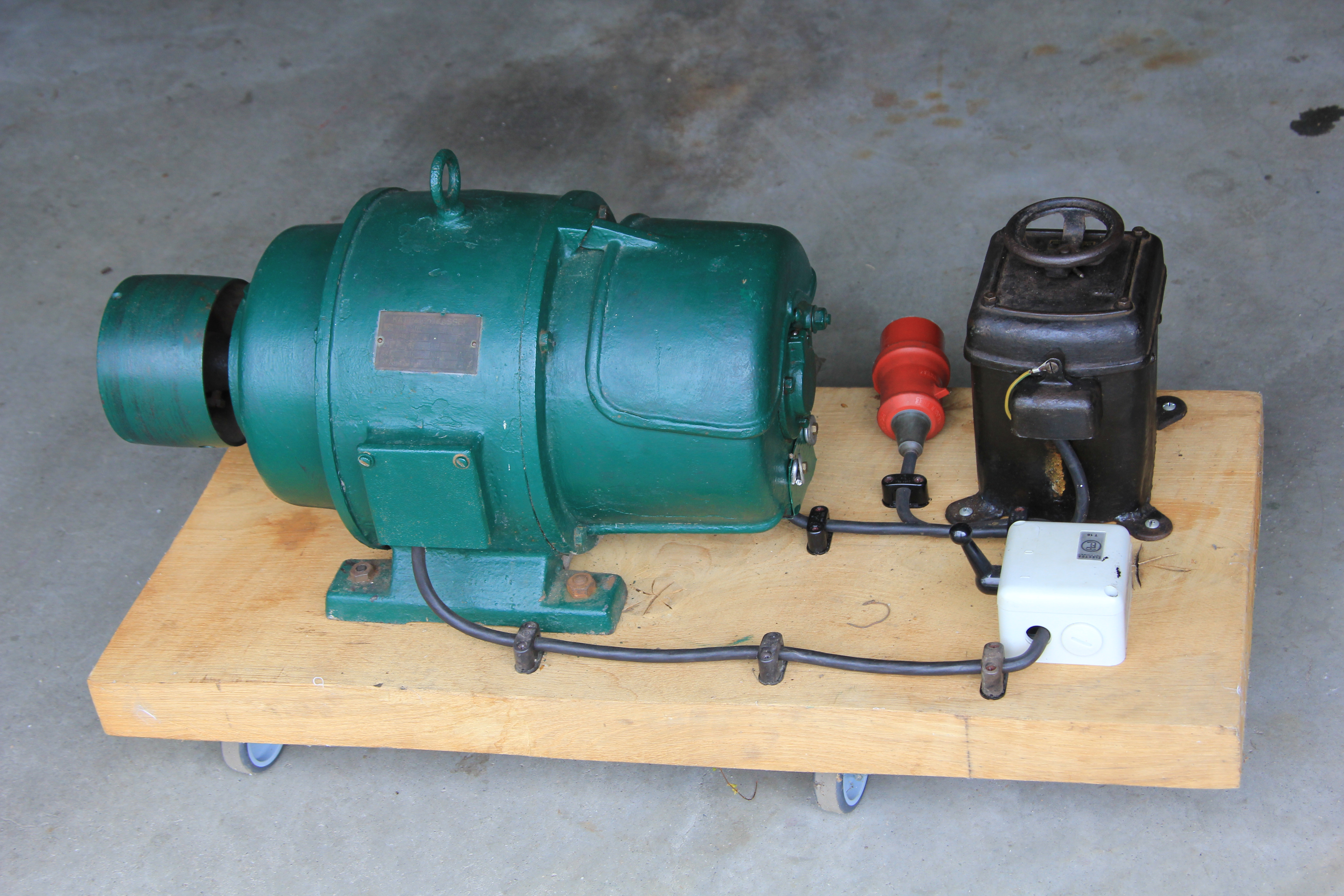 Historischer Drehstrom-Schleifringläufermotor mit 4 PS (2,9 kW) von KATT & Co., Kassel. Wahrscheinlich 1930er-Jahre, bereits kugelgelagert. Motor (grün-blau), Schalter (weiß), CEE-Stecker für 16A und Anlasswiderstand (schwarz).